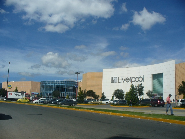 Centro Comercial Galerias Pachuca